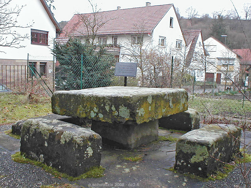 Zaberfeld-Leonbronn, alter Gerichtstisch des abgegangenen Dorfes Mörderhausen